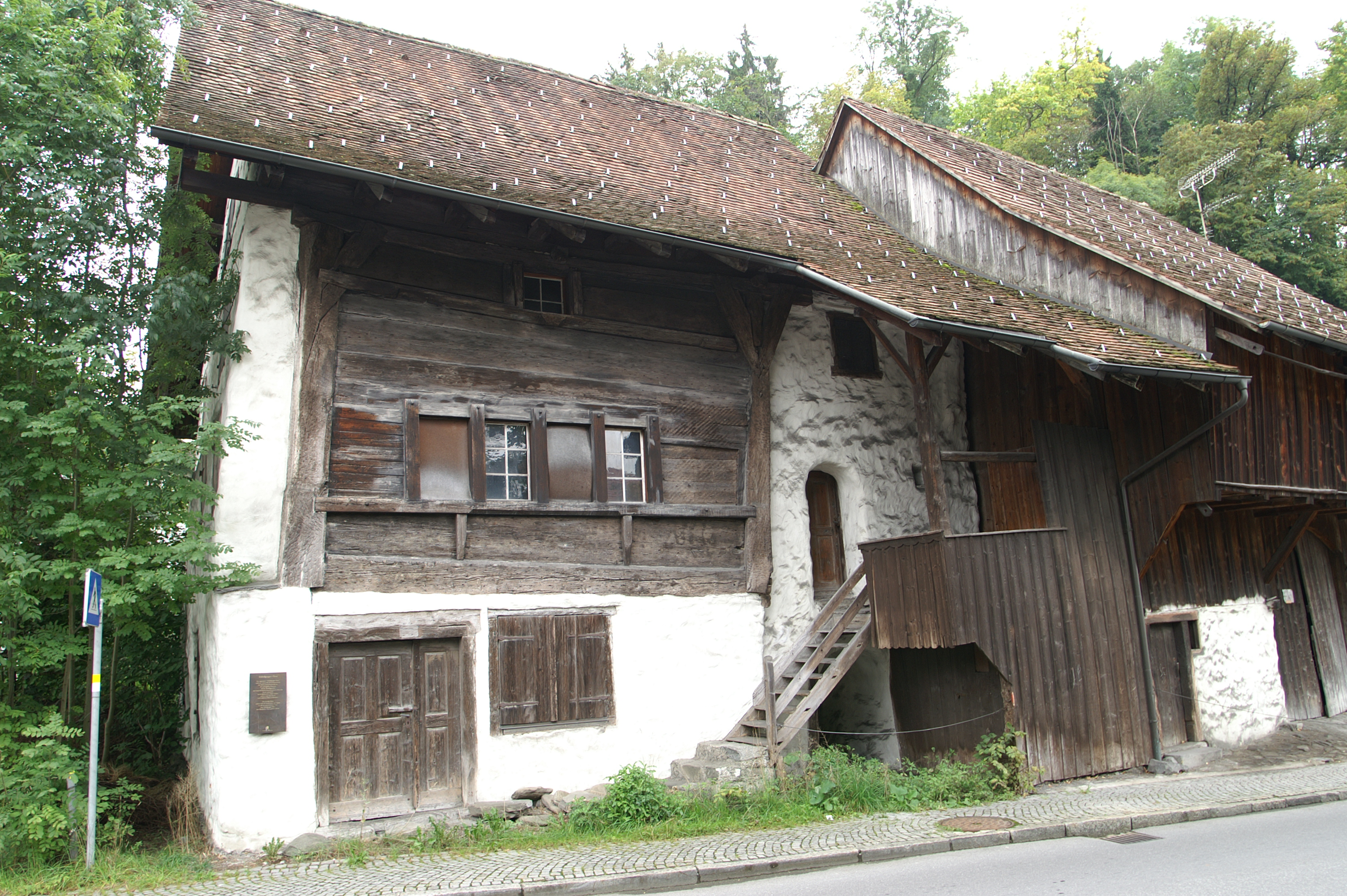 aus dem DEHIO Vorarlberg 1983: Sogenanntes Schloßguggerhaus, halbvollendeter Rheintalhof, Wohnteil 2geschossig über Werkstatt, giebelseitig in Bruchsteinmauerwerk errichtet, im Giebel Fachwerk, traufseitig über Mauerwerk Bohlenständerkonstruktion, gekoppelte Fenster, segmentbogige Eingangstür, traufseitige Freitreppe.*** An der Sebastianstraße Nr.24 in Dornbirn, Oberdorf; Es ist das älteste Haus (um 13.Jh.) in Dornbirn.